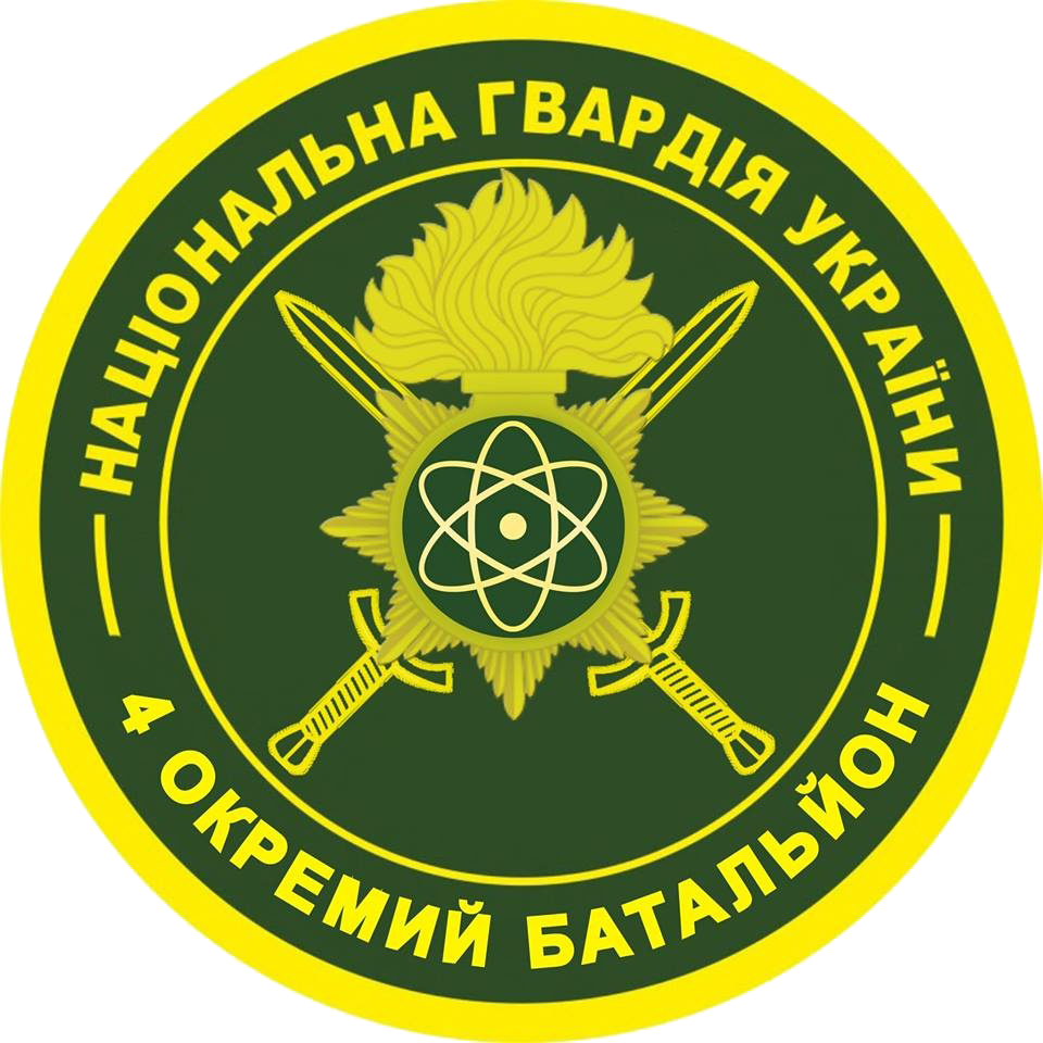 нарукавний знак, 4-й окремий батальйон ОВДО, Національна гвардія України